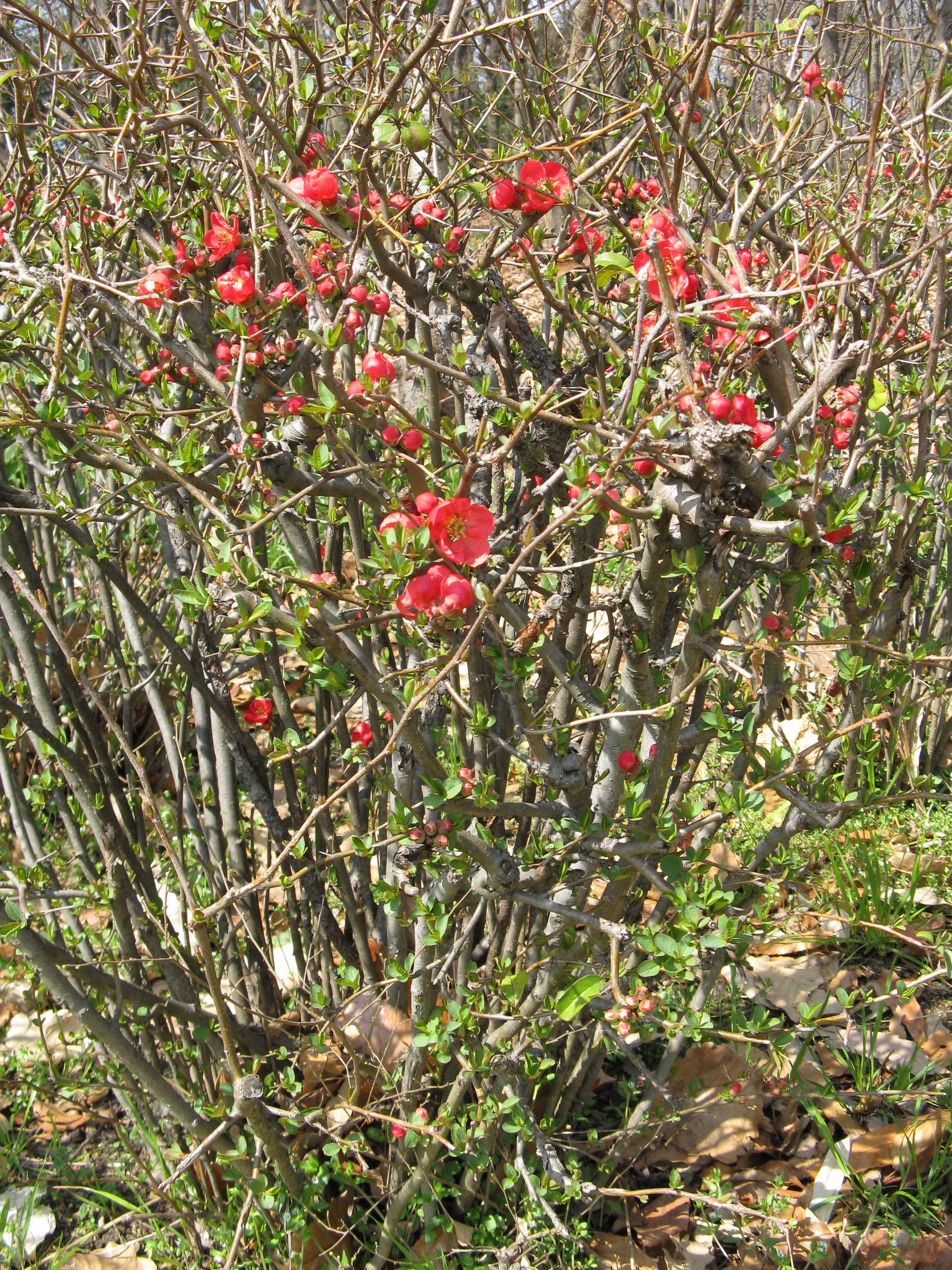 Chaenomeles lagenaria